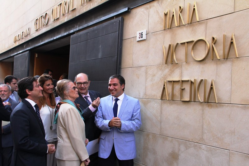 Momento en que se bautiza el Centro Cultural con el nombre de la poeta malagueña María victoria Atencia. Junto a ella, el presidente de la Diputación de Málaga, Elías Bendodo.